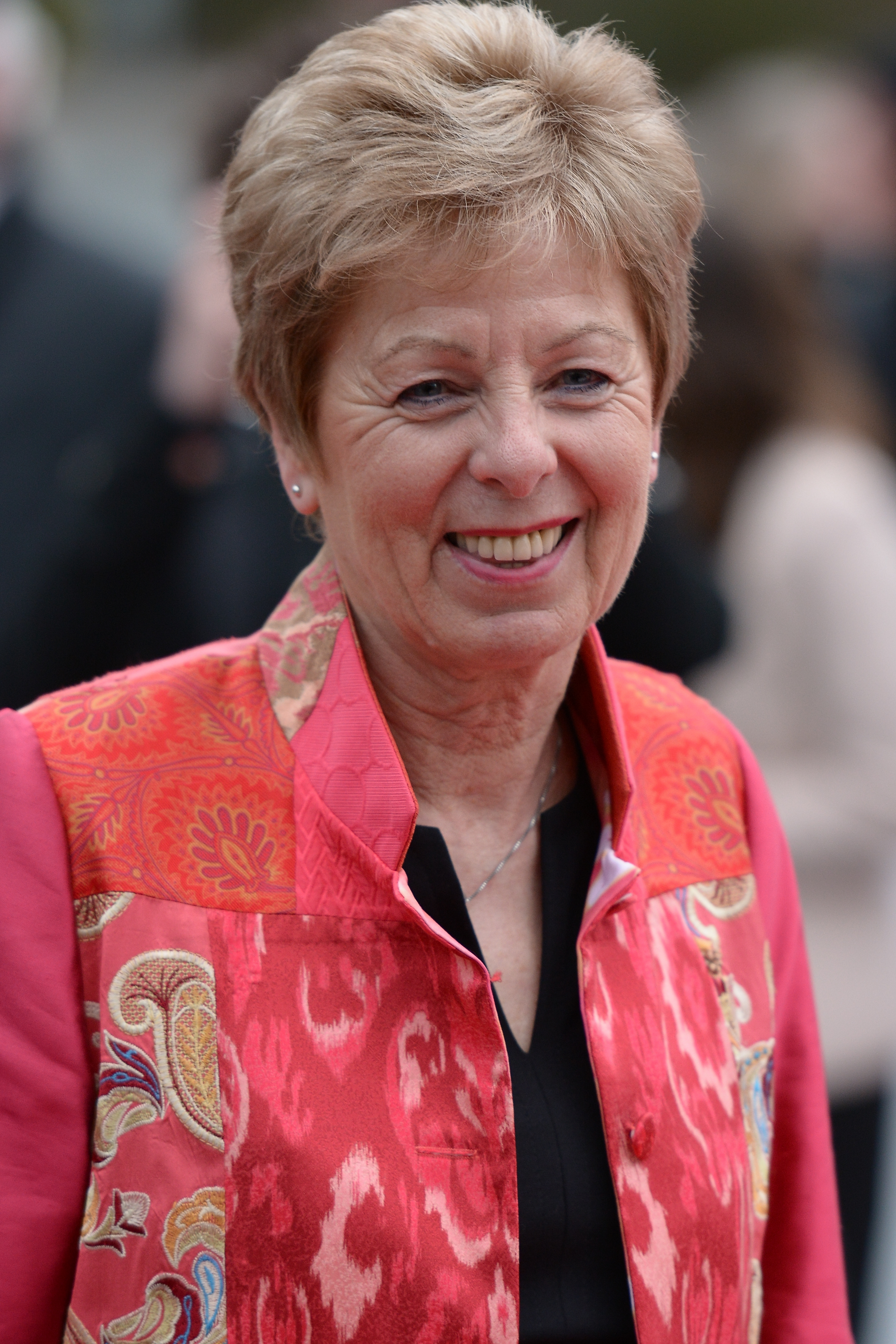 Verleihung des Grimme-Preises 2015.